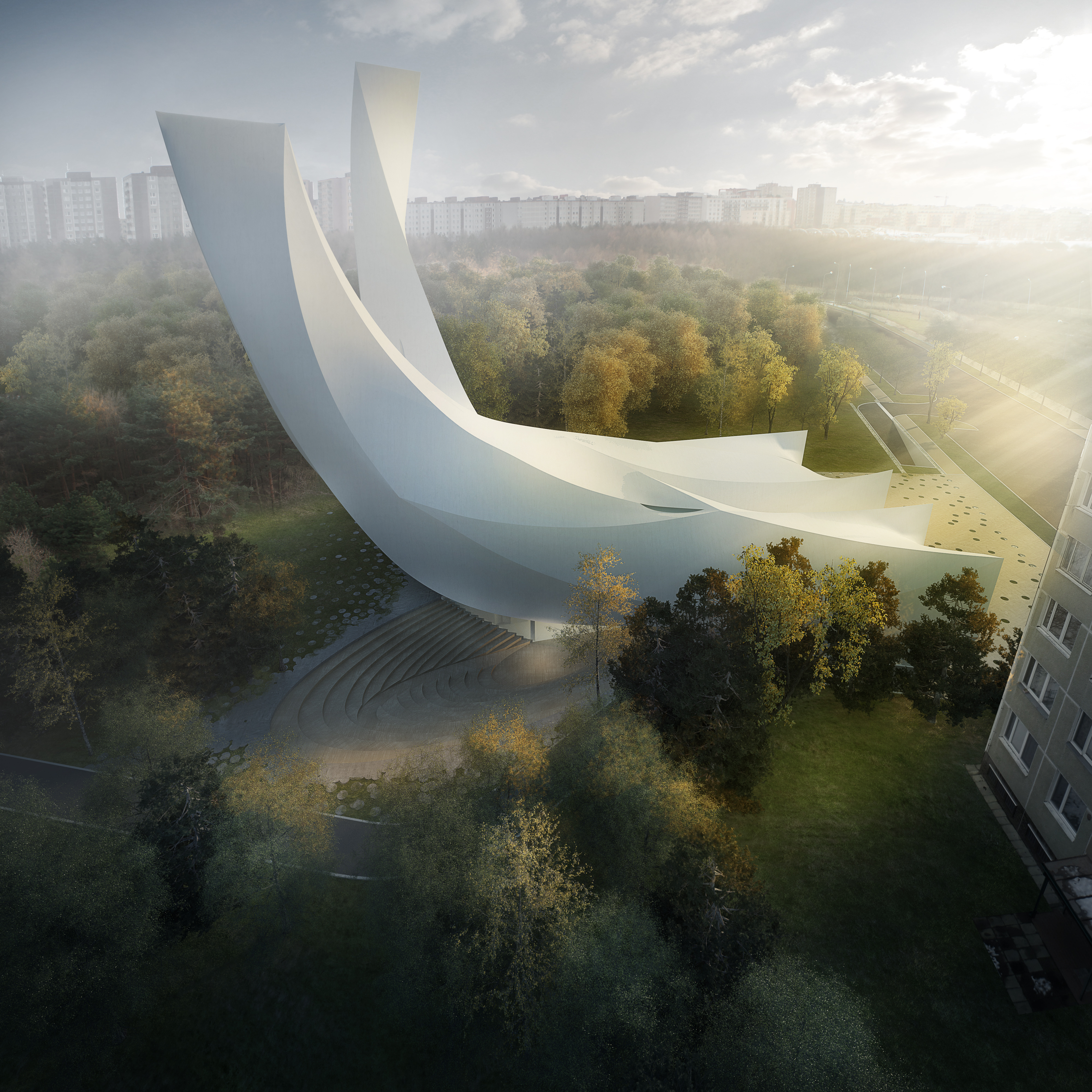 Vizualizace návrhu Kostela Krista Spasitele a komunitního centra pro pražský Barrandov (2-3. místo v soutěži)